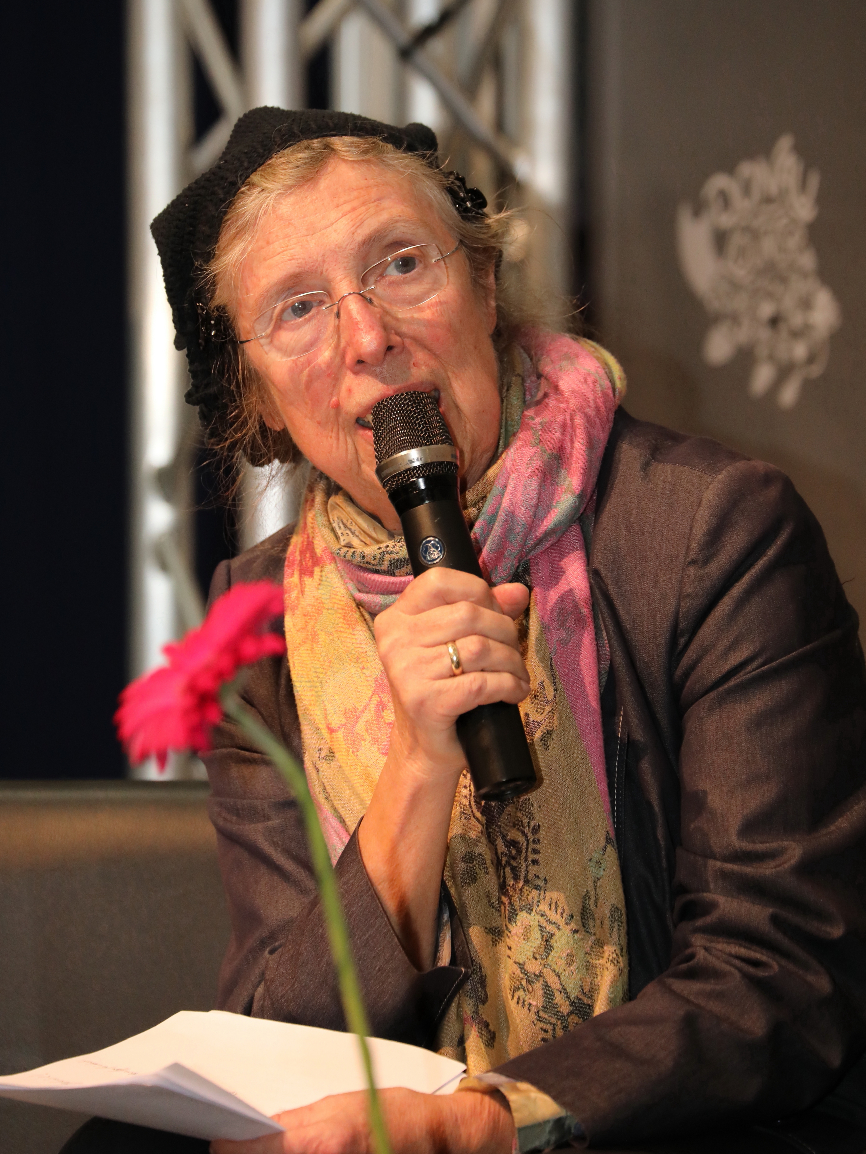 Die österreichische Schriftstellerin Ditha Brickwell auf der Wiener Buchmesse 2019.